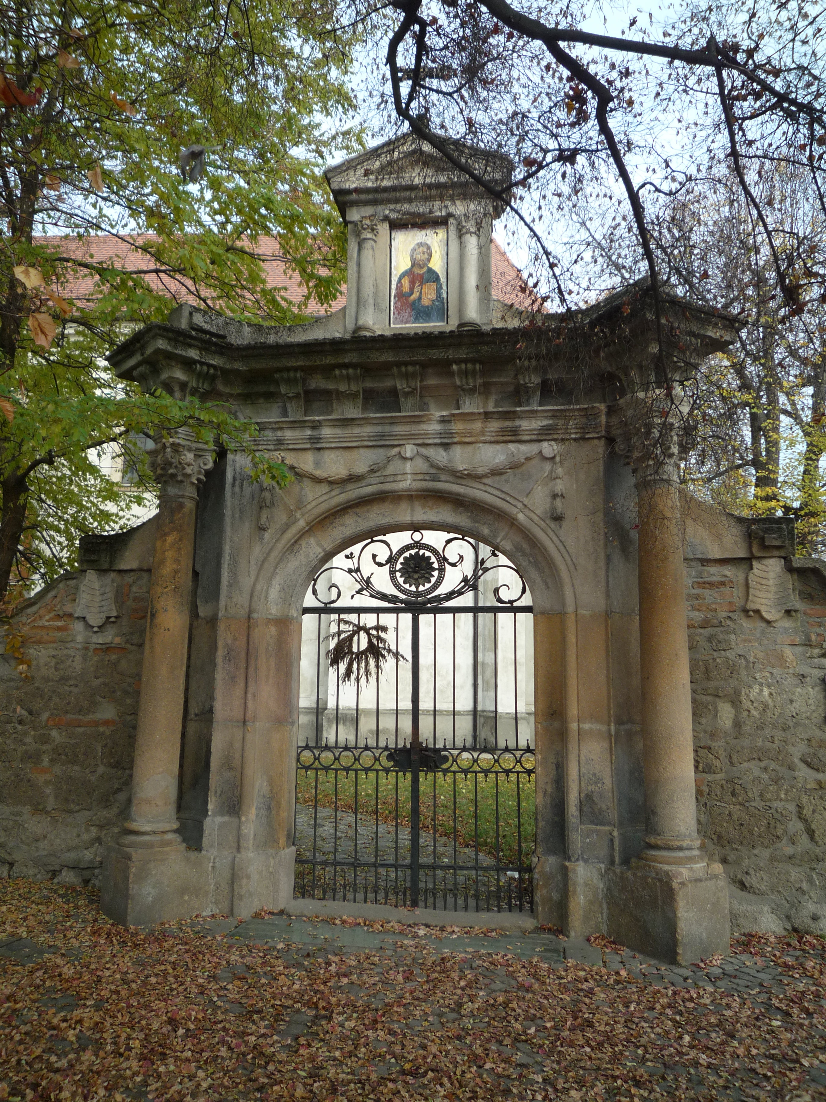 Вход в церковь Преображения